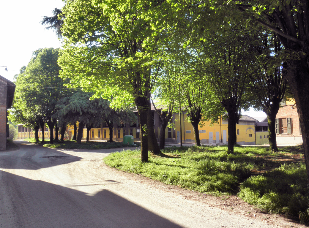 Vista di Monticelli, frazione di Bertonico.